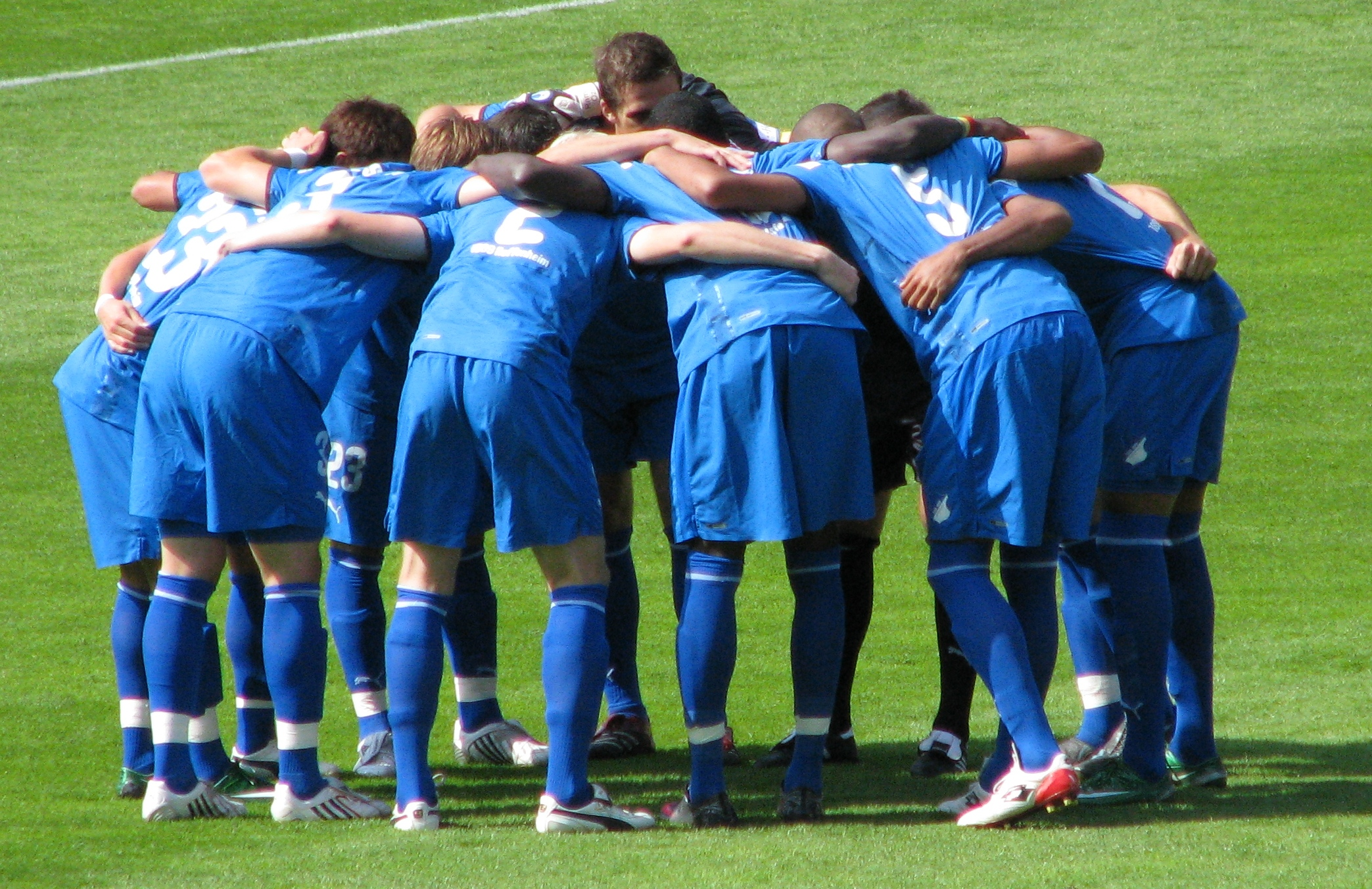 TSG Hoffenheim Heinmspielpremiere im Mannheimer Carl-Benz-Stadion am 23. August 2008